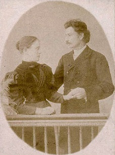 Georgij Gapon e la moglie Aleksandra K. Uzdalёva